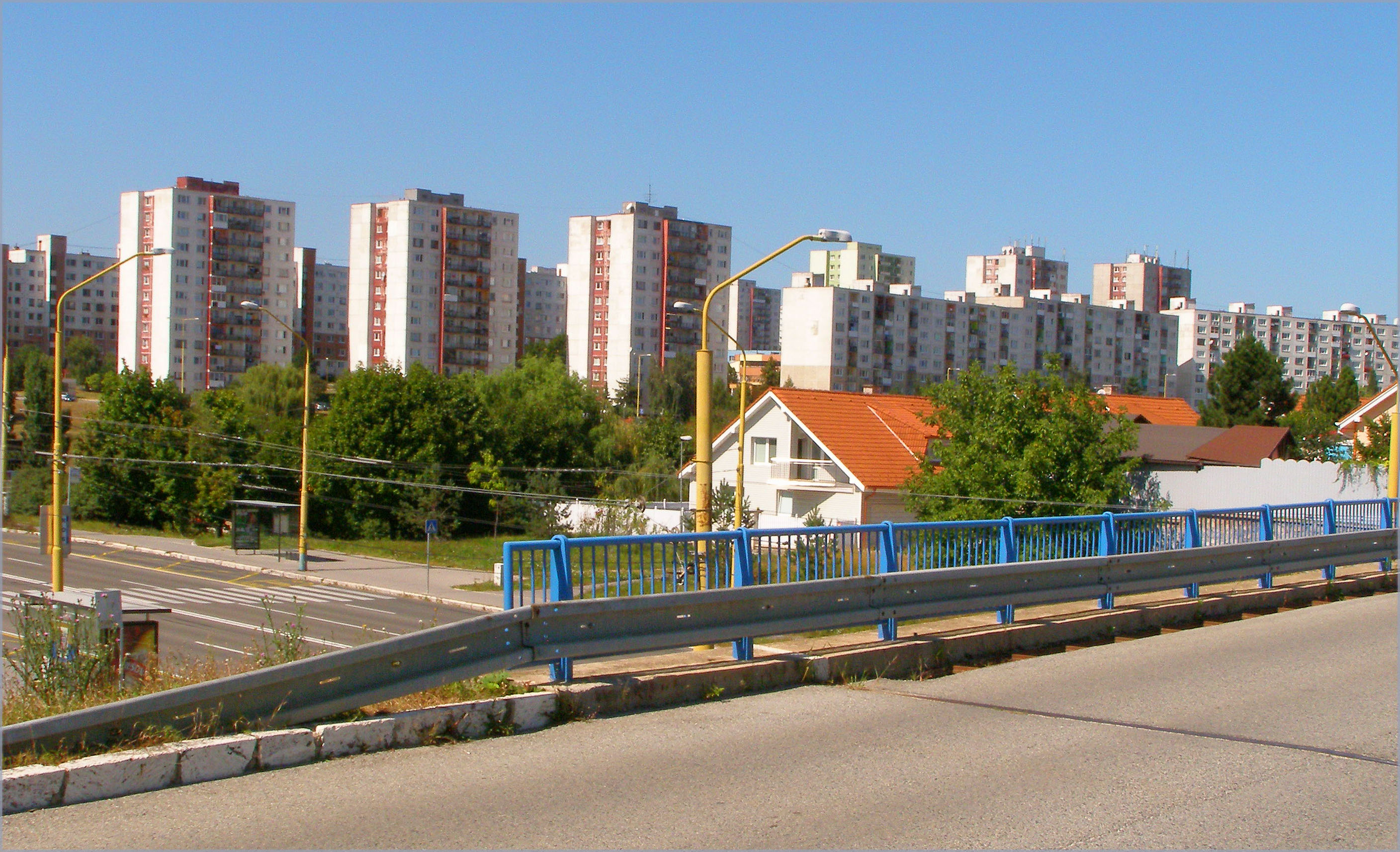 Pohľad na Wuppertálsku a Cottbuskú ulicu